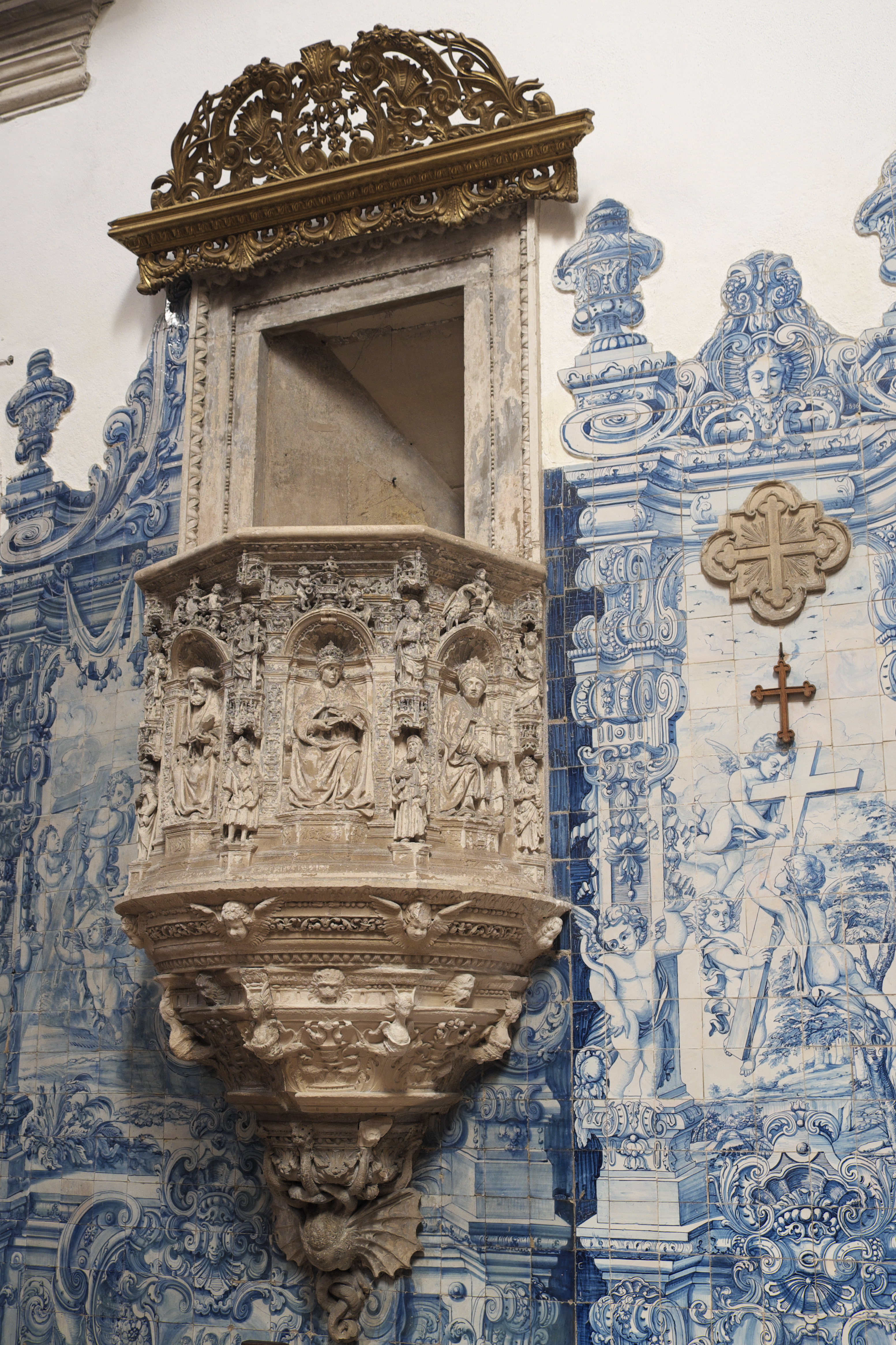 Ehemalige Augustinerchorherrenstiftskirche Santa Cruz in Coimbra (Portugal), Renaissance-Kanzel von Nicolau Chanterene, von 1521